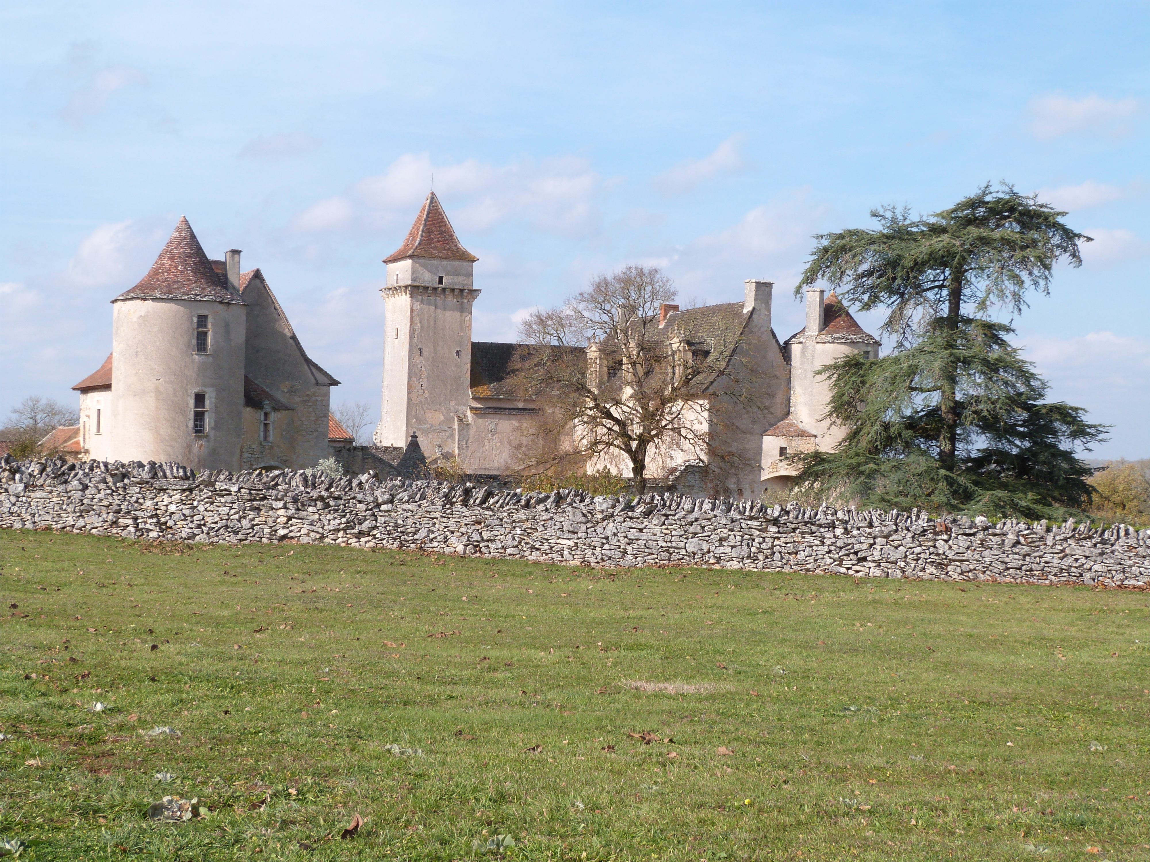 Château de Couanac(vue générale)